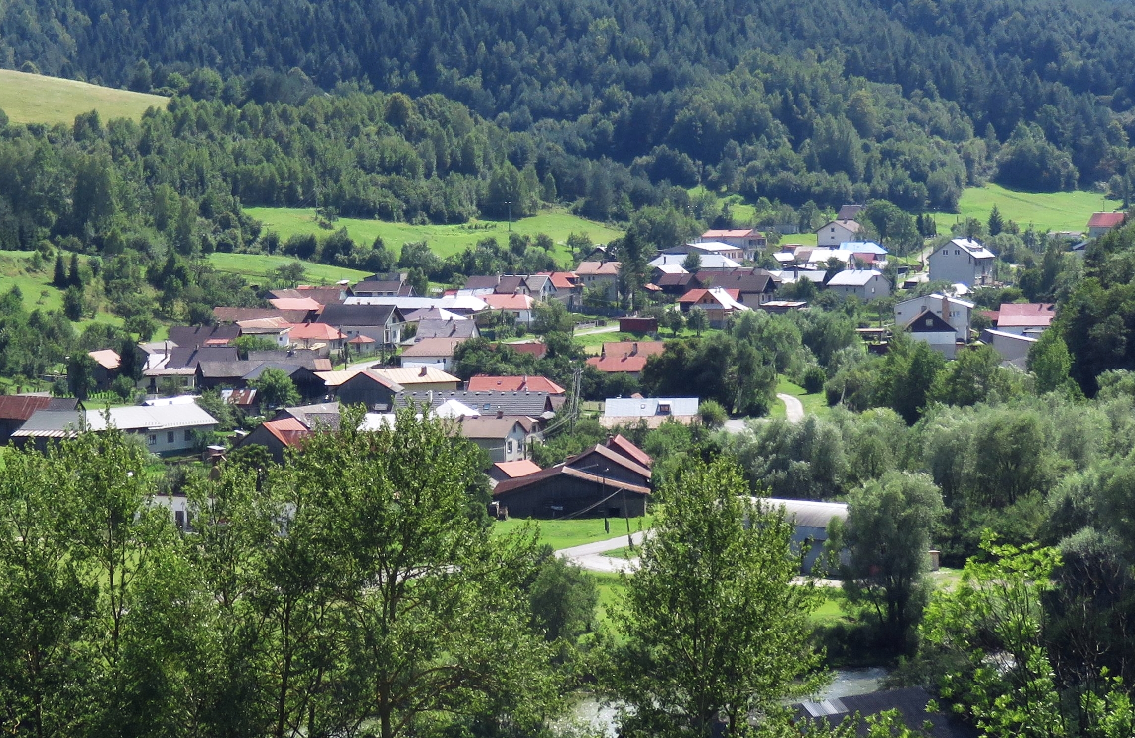 Maly Lipnik